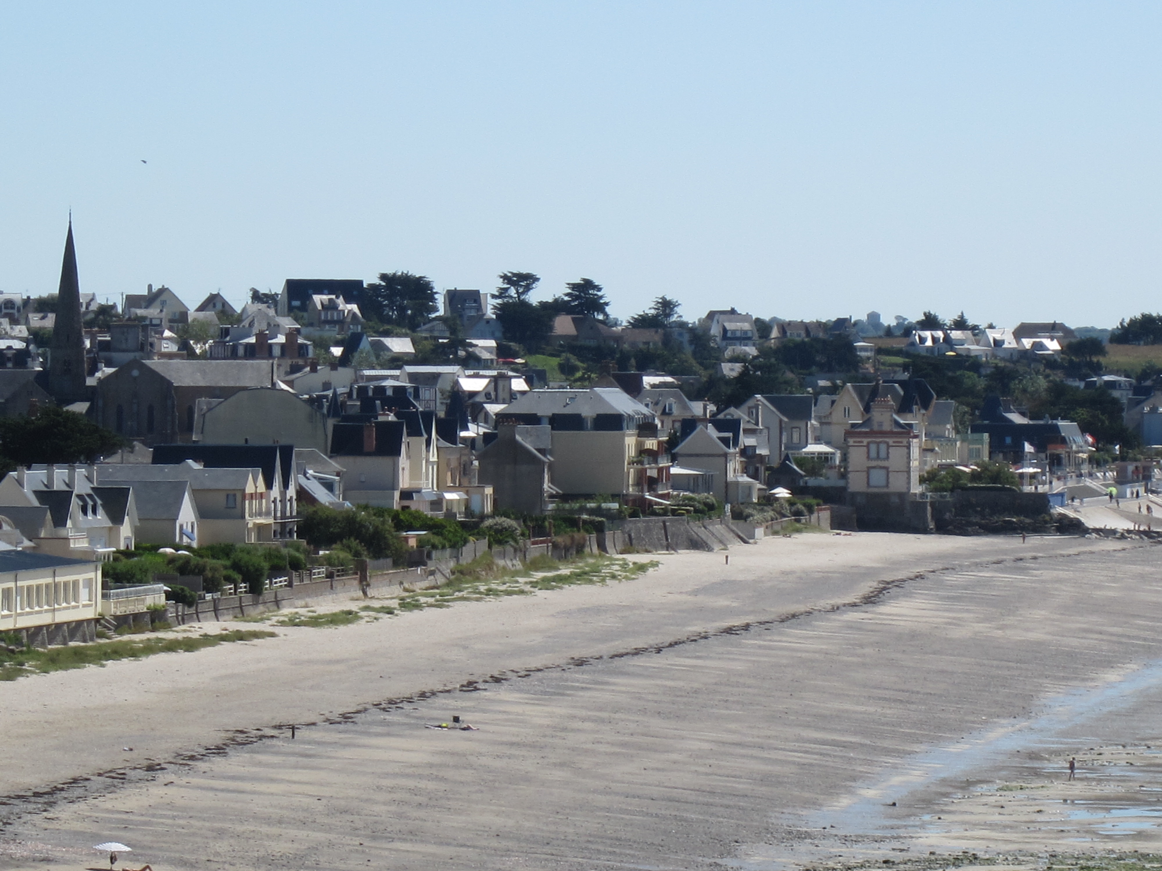 Vue sur Saint-Pair-sur-Mer et sa plage Saint-Nicolas